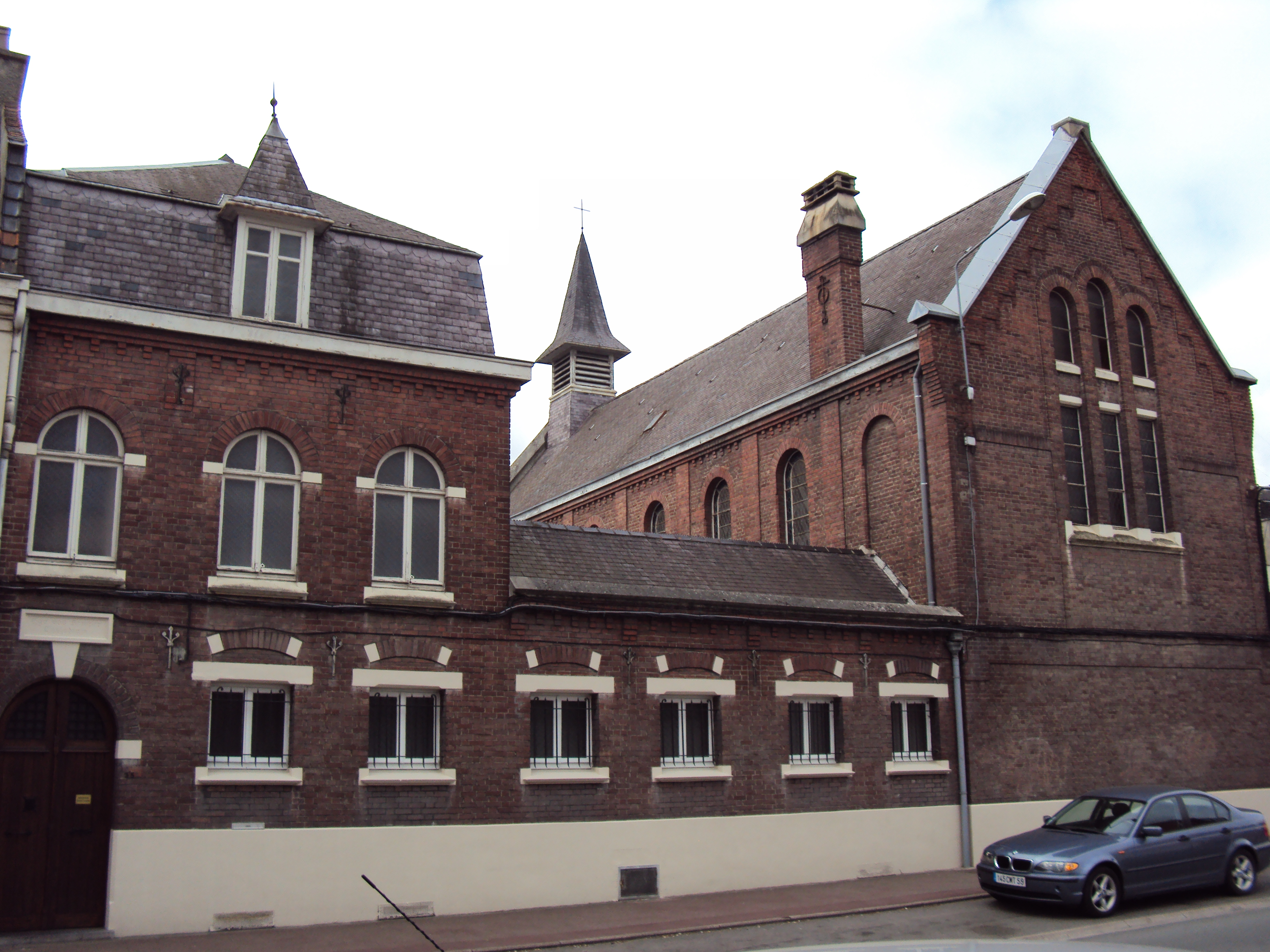 Façade du Monastère Sainte-Claire à Haubourdin (France)